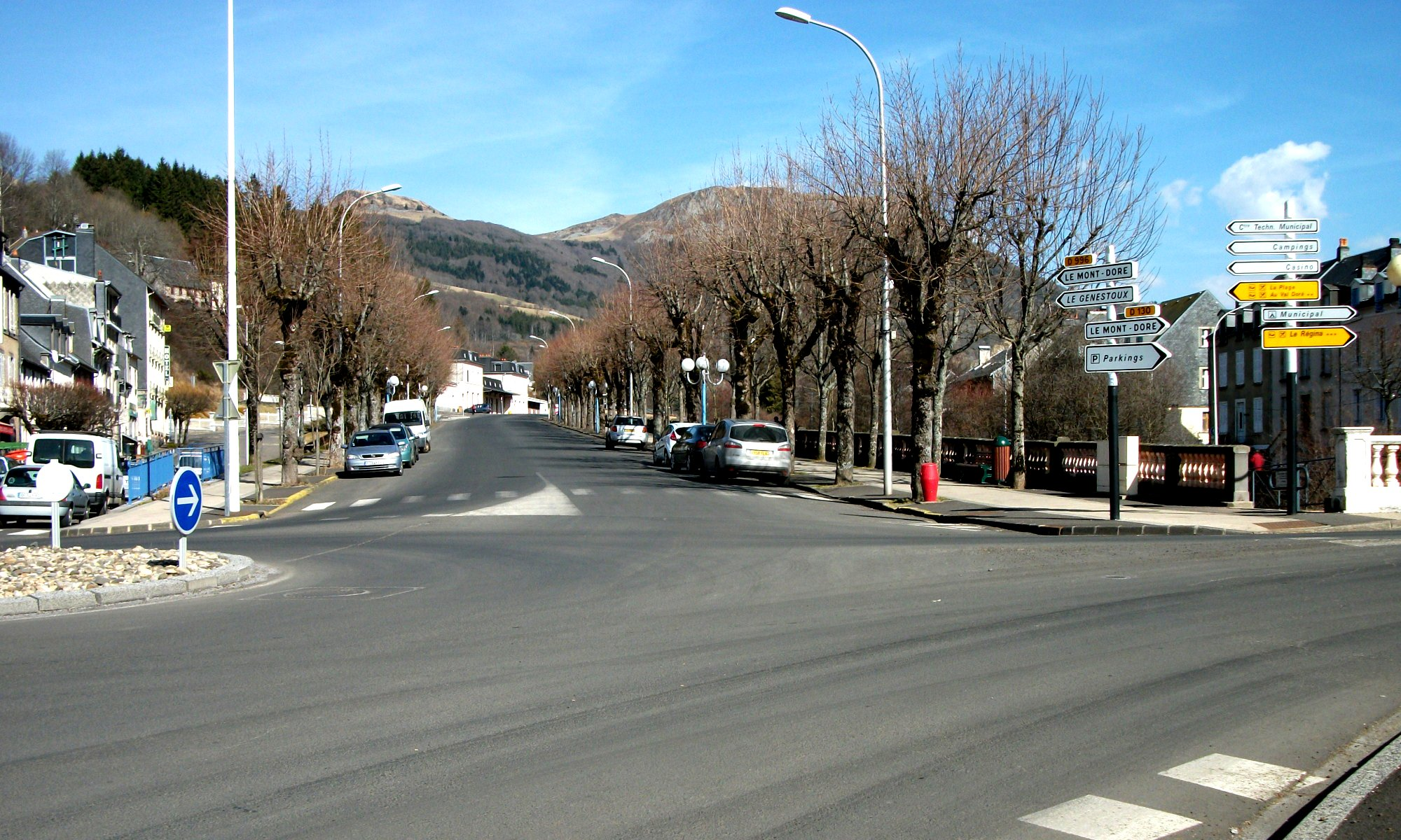 Routes départementales 996 et 130 en direction du Mont-Dore. La Bourboule, Puy-de-Dôme, France.